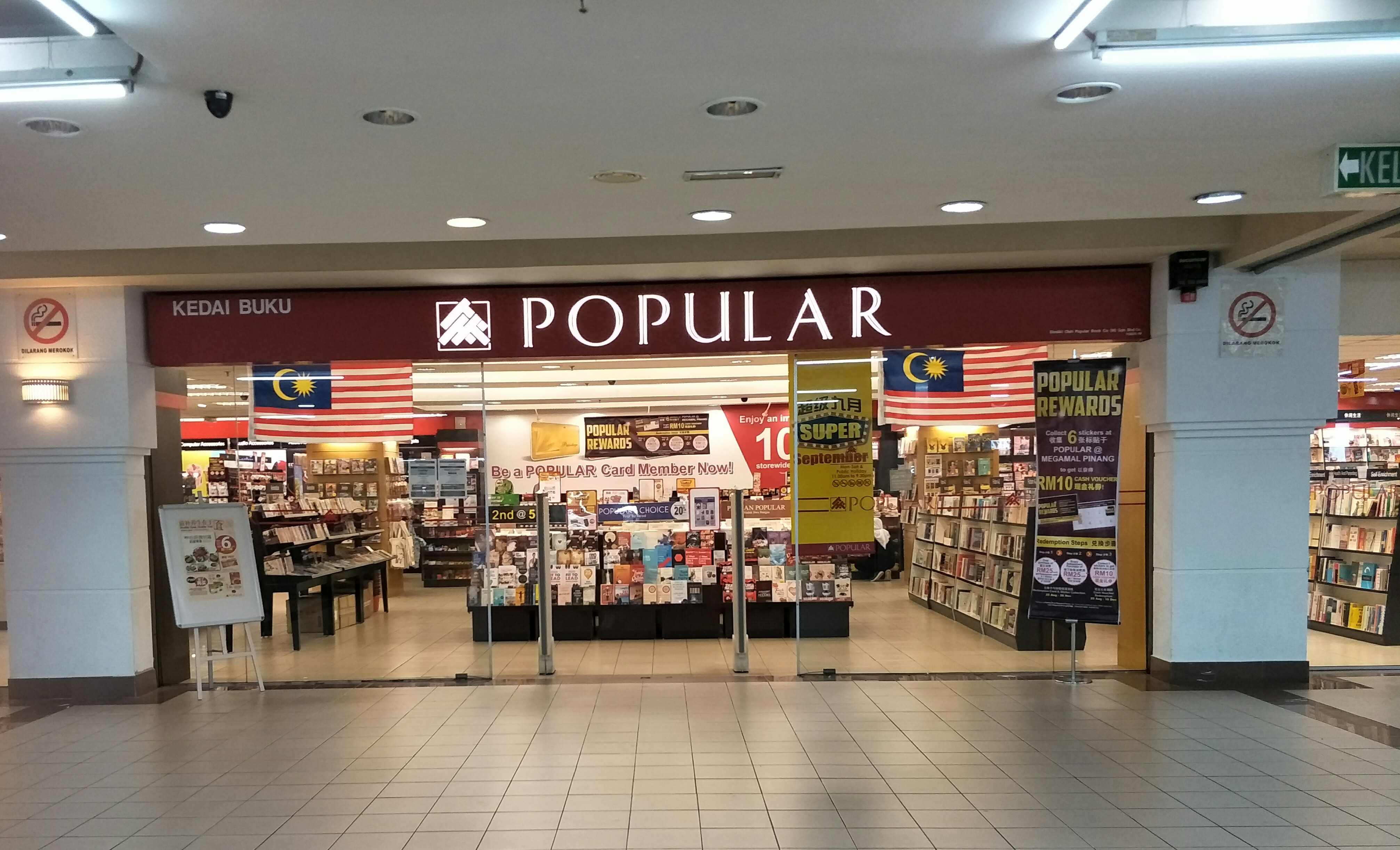 美嘉广场内的大众书局